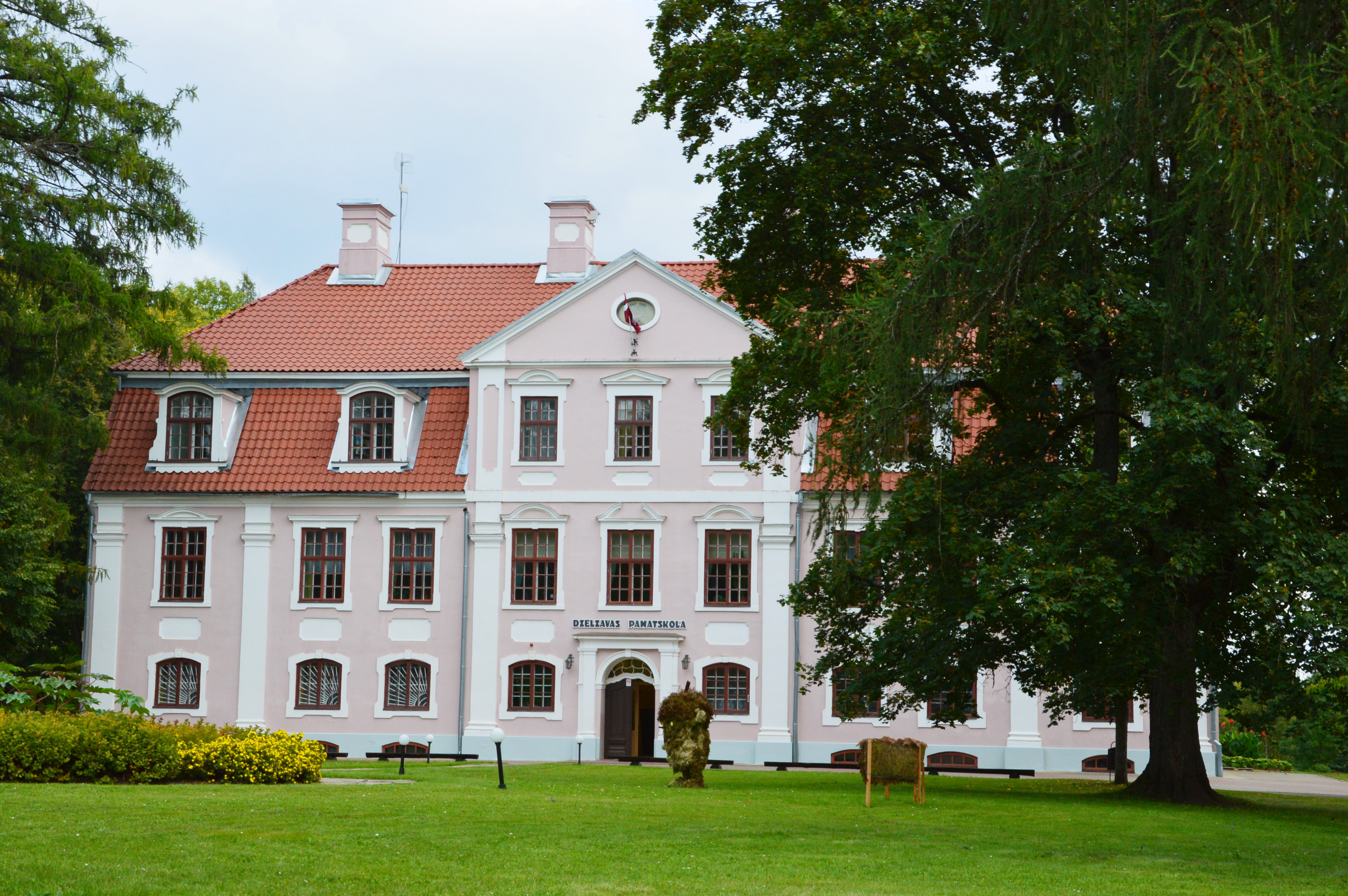 Dzelzava mõis